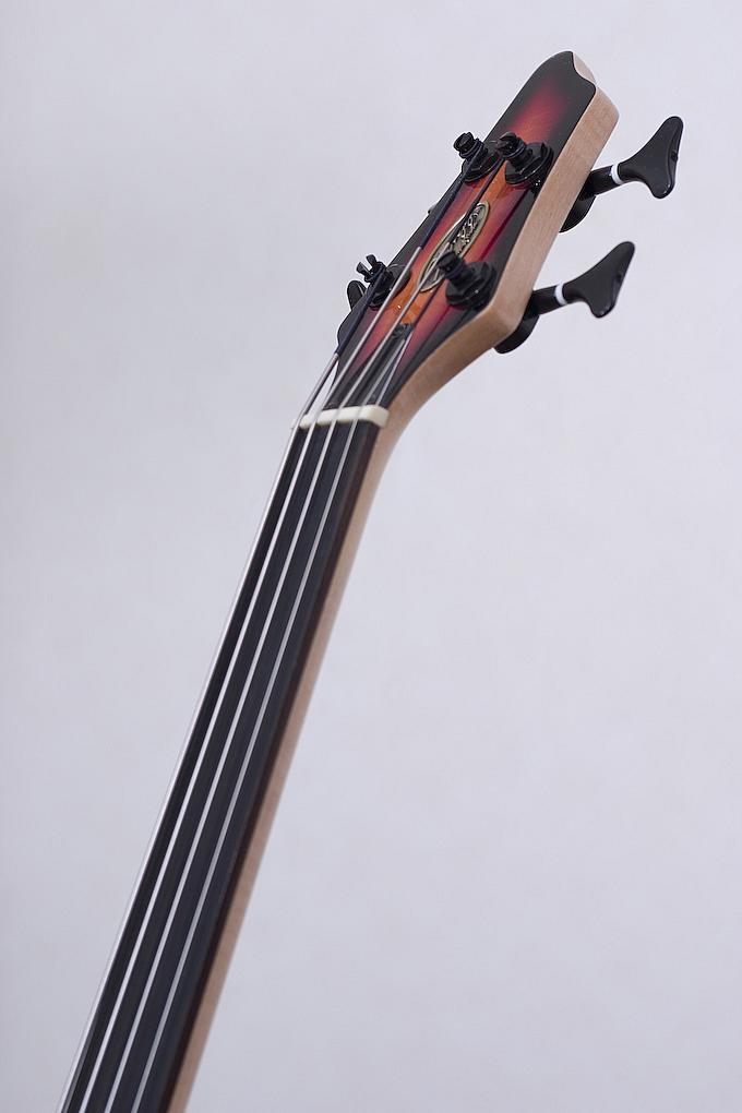 Stagg BC300FL-SB Fretless Bass Fingerboard